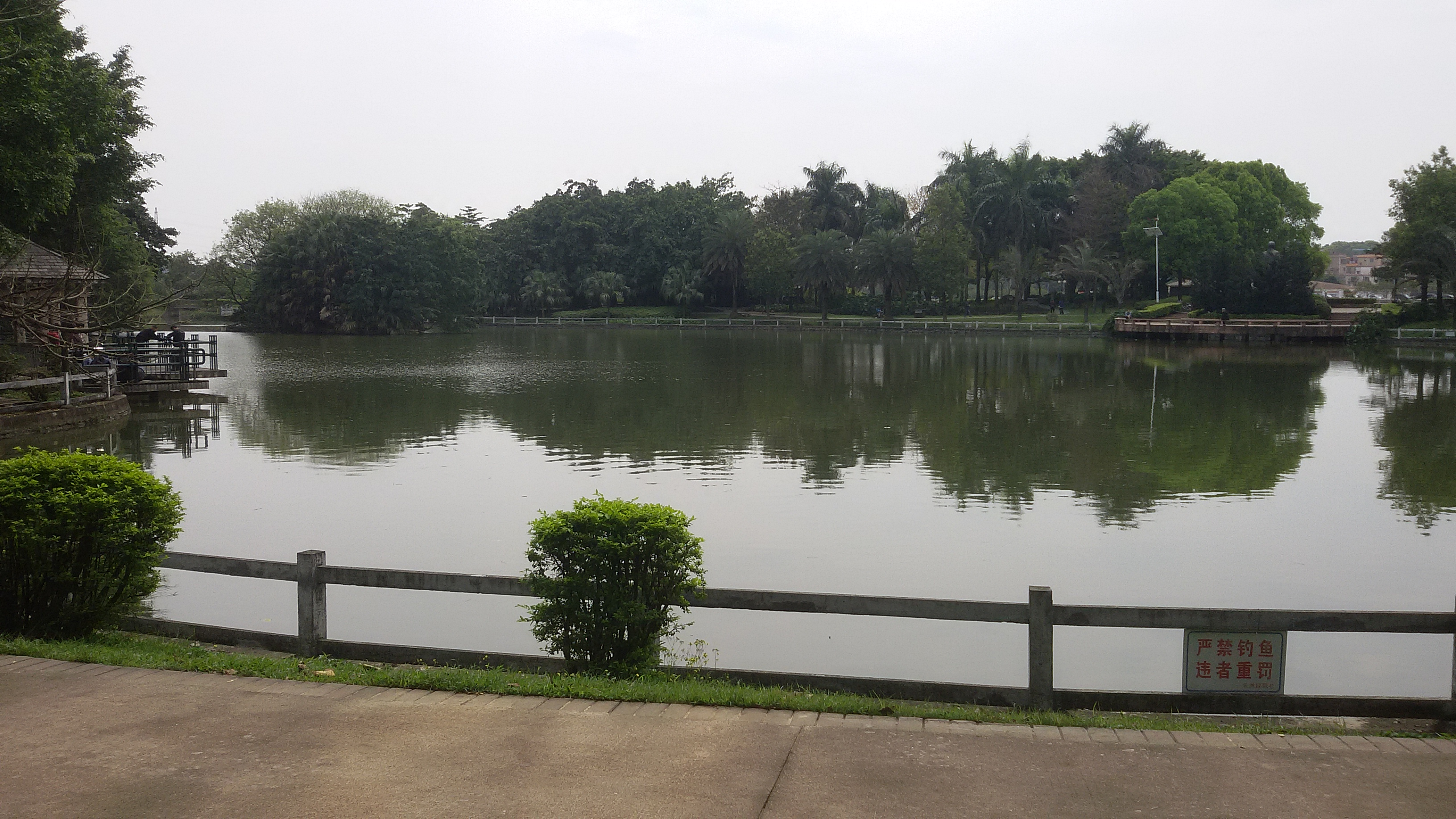 粵語: 黄埔区中山公园